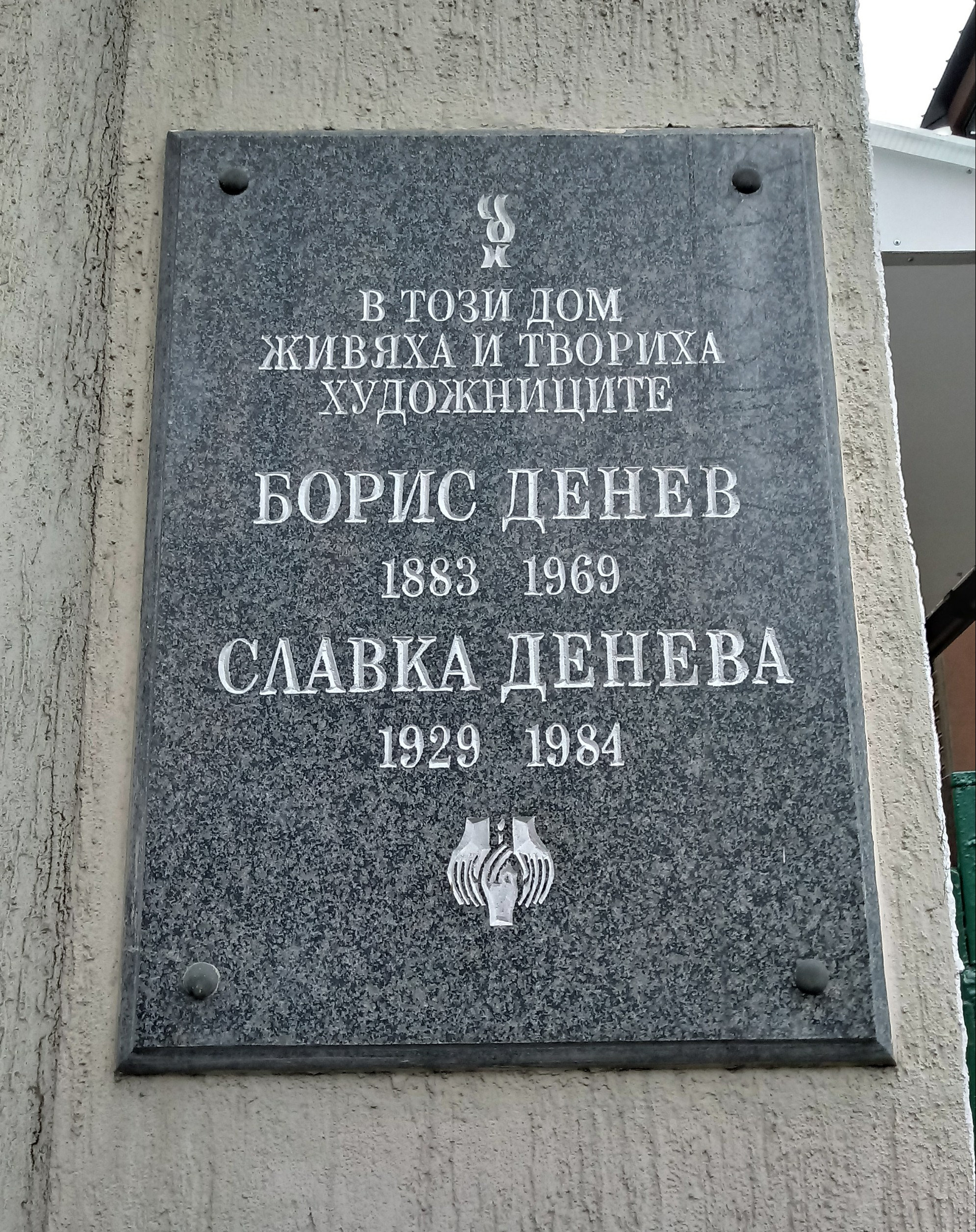 Домът на художниците Борис Денев и Славка Денева на ул. „Шипка“ 18 в София